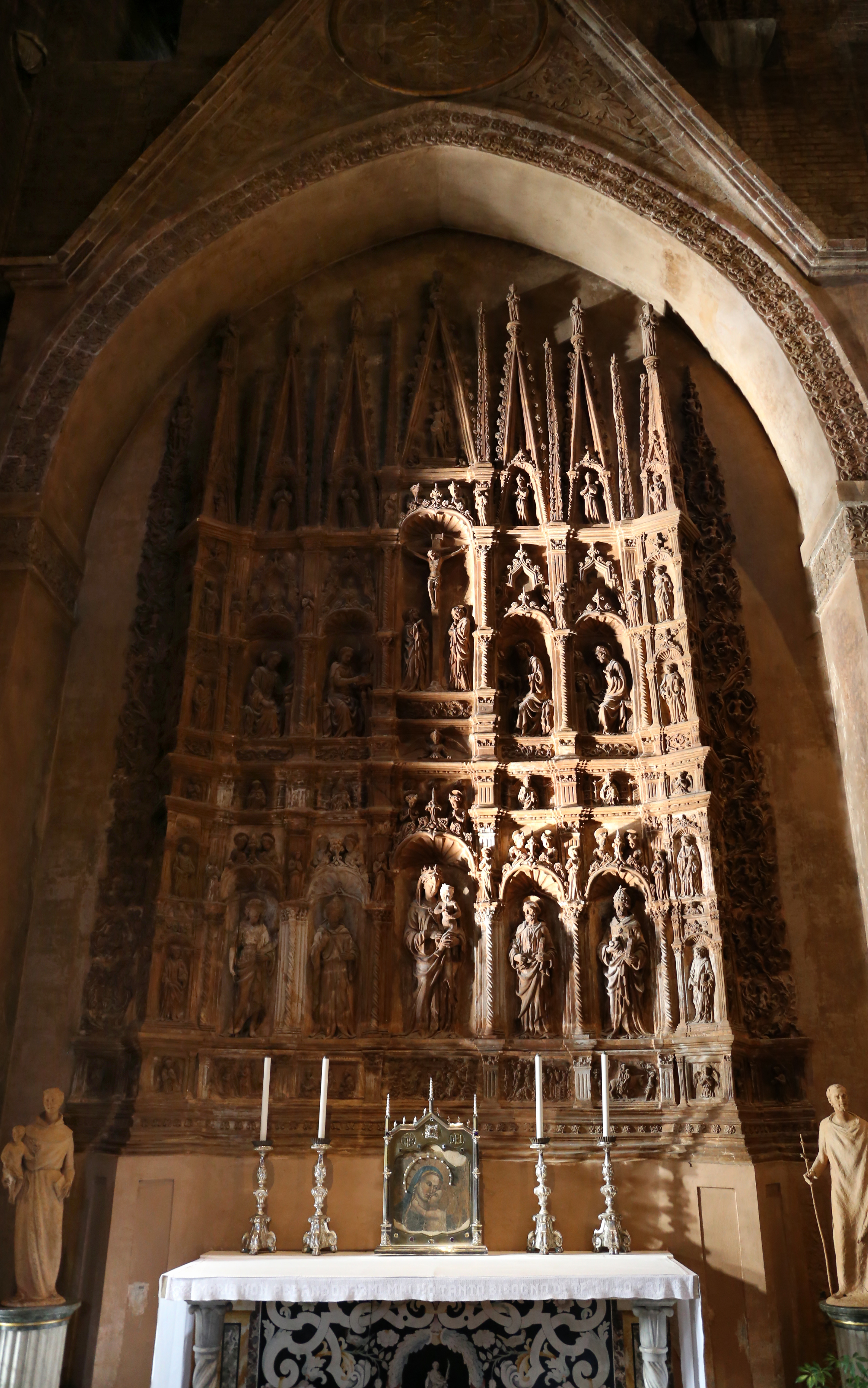 Piazza Grande (Modena) This is a photo of a monument which is part of cultural heritage of Italy.